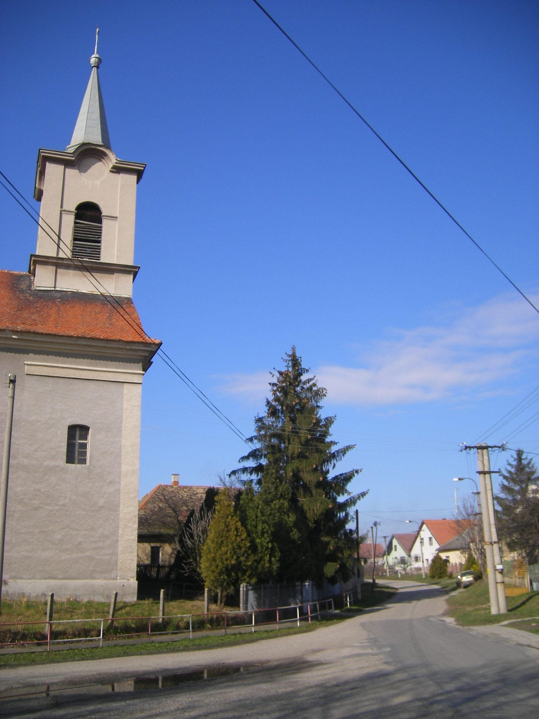 Ekel - katolikus templom